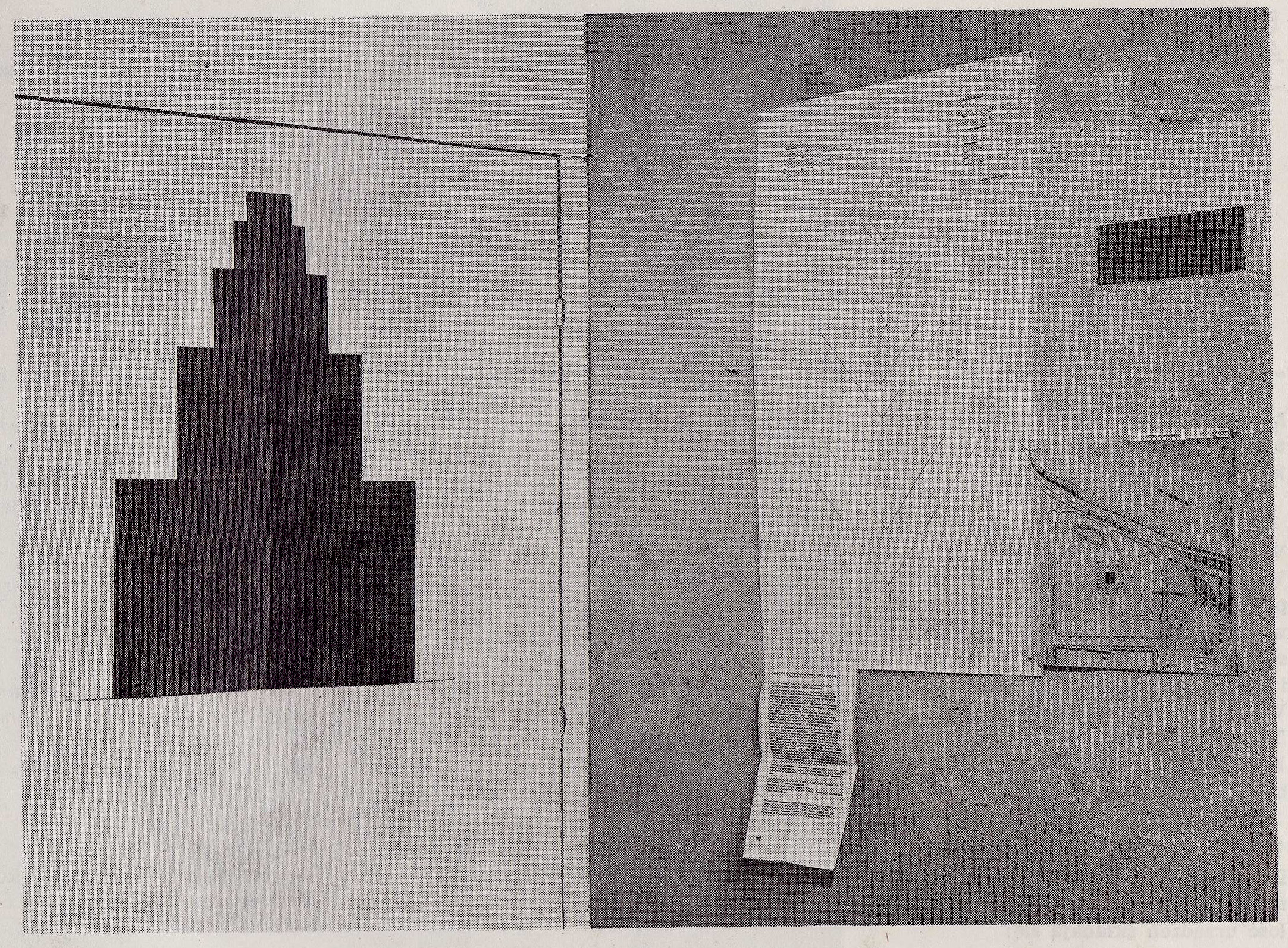 Andrzej Wojciechowski, projekt "Cokołu samowystarczalnego", 1970. Miejsce prezentacji: Sympozjum Plastyczne Wrocław '70, Wrocław, 1970. Fotografia: najprawdopodobniej Jan Bortkiewicz lub Michał Diament lub Zdzisław Holuka lub Czesław Żuk. Źródło: "Sympozjum Plastyczne Wrocław '70", red. Danuta Dziedzic, Zbigniew Makarewicz, Zjednoczone Przedsiębiorstwa Rozrywkowe Ośrodek Teatru Otwartego "Kalambur", Wrocław 1983, s. 145.